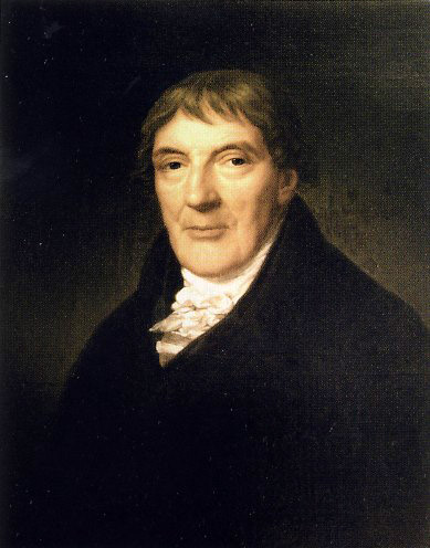 Ölgemälde: Der Hamburger Arzt und Naturforscher Johann Albert H(e)inrich Reimarus.